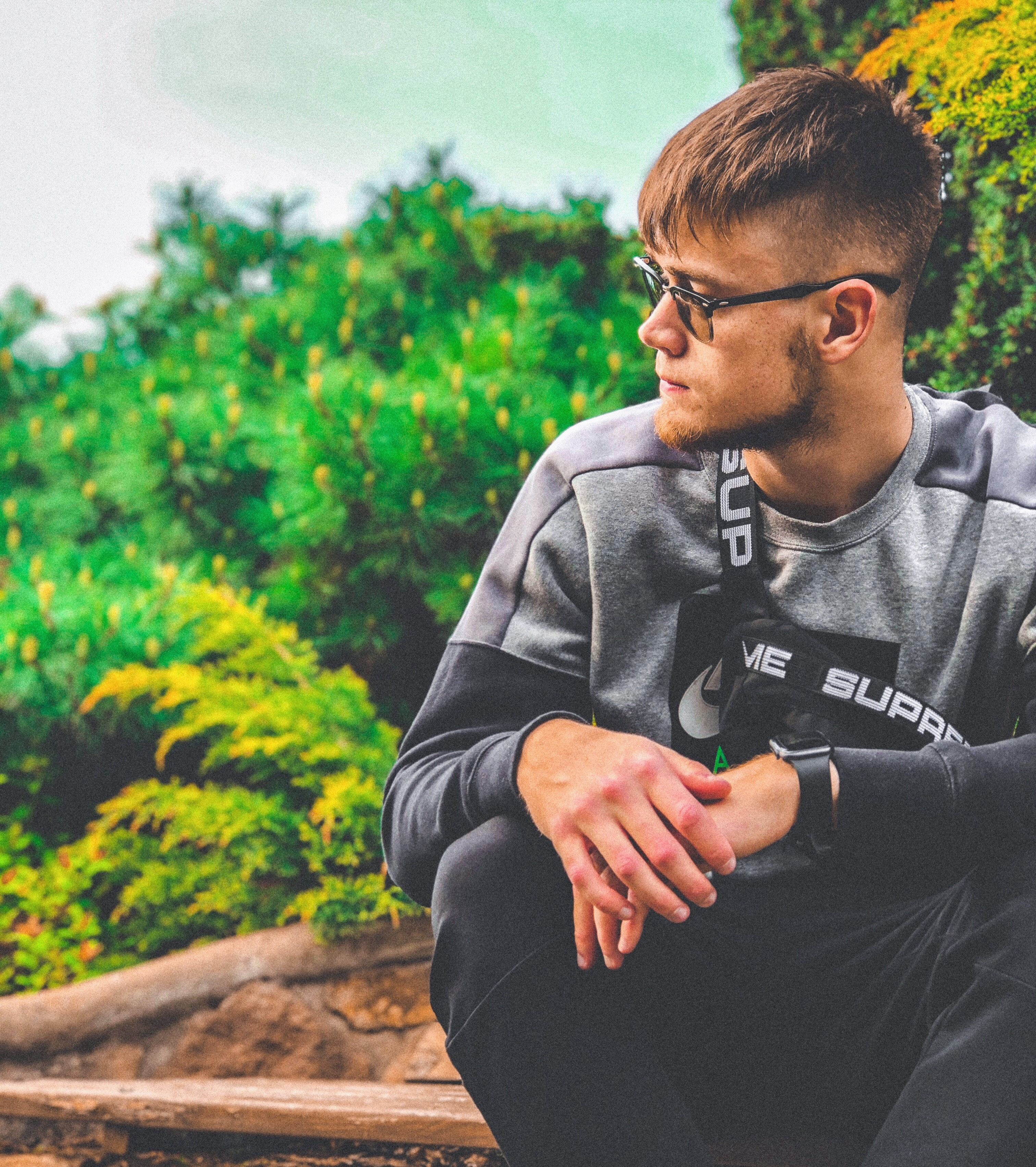 The Insidia Project v roce 2019